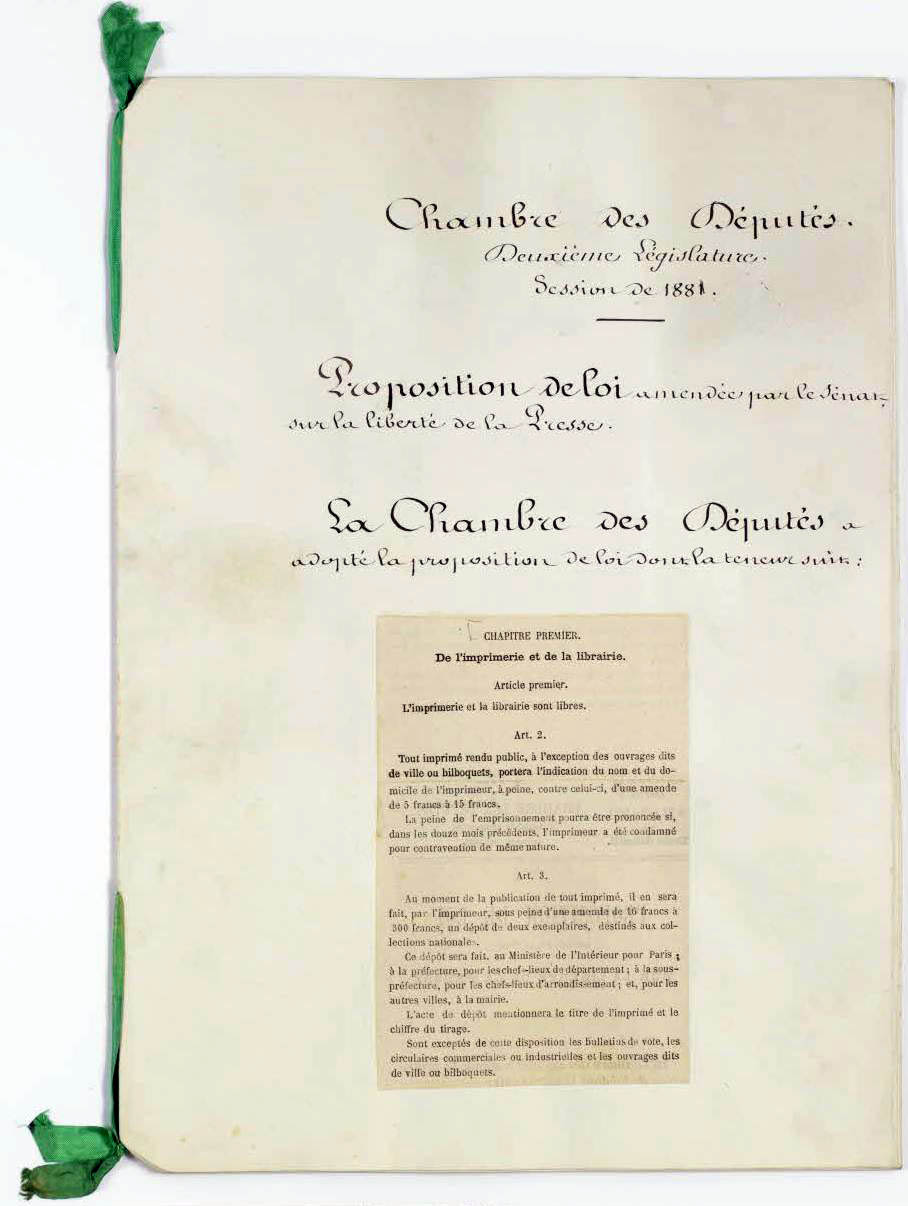 Original de la loi sur la liberté de la presse de 1881